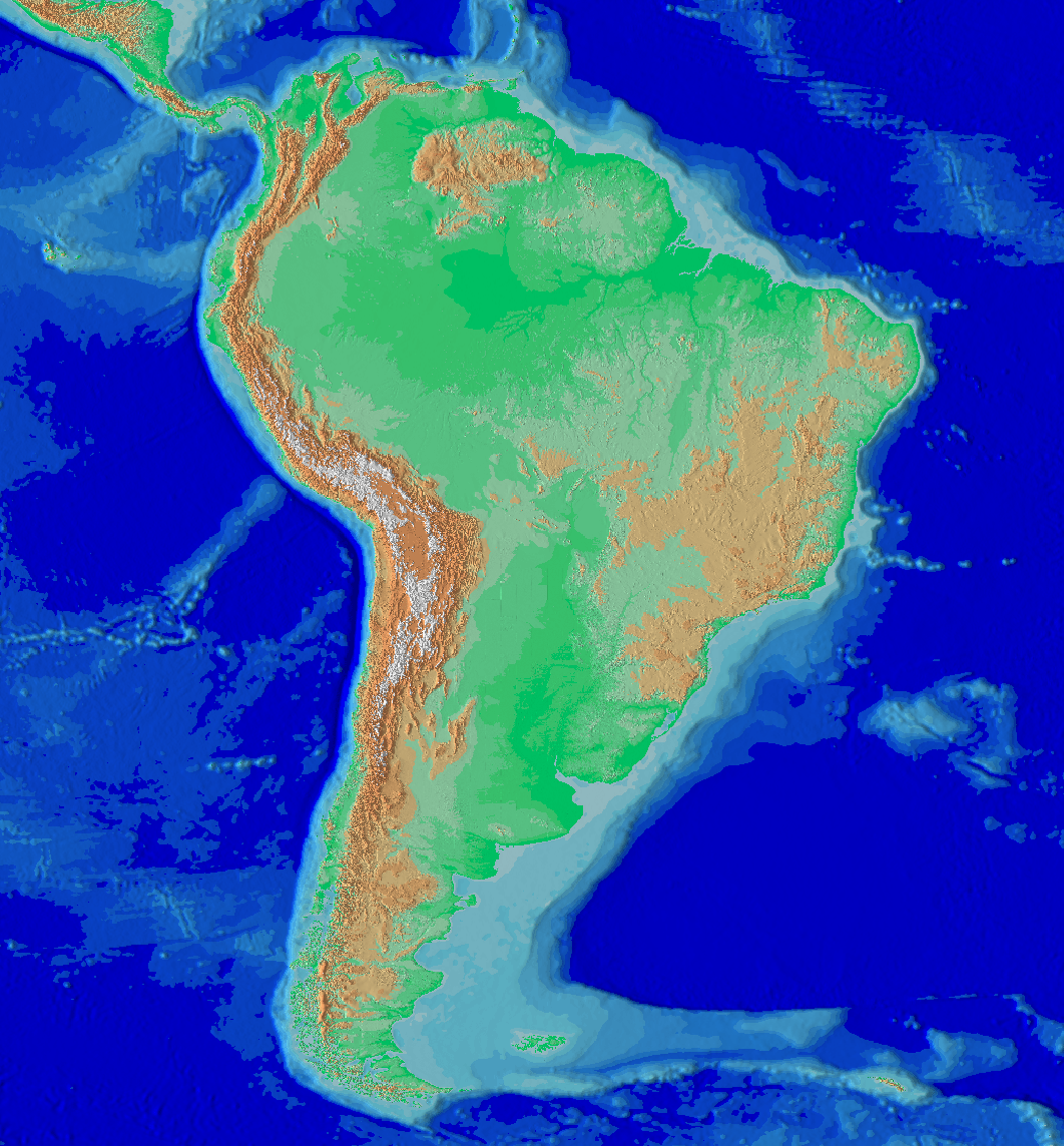 Andes Americanos